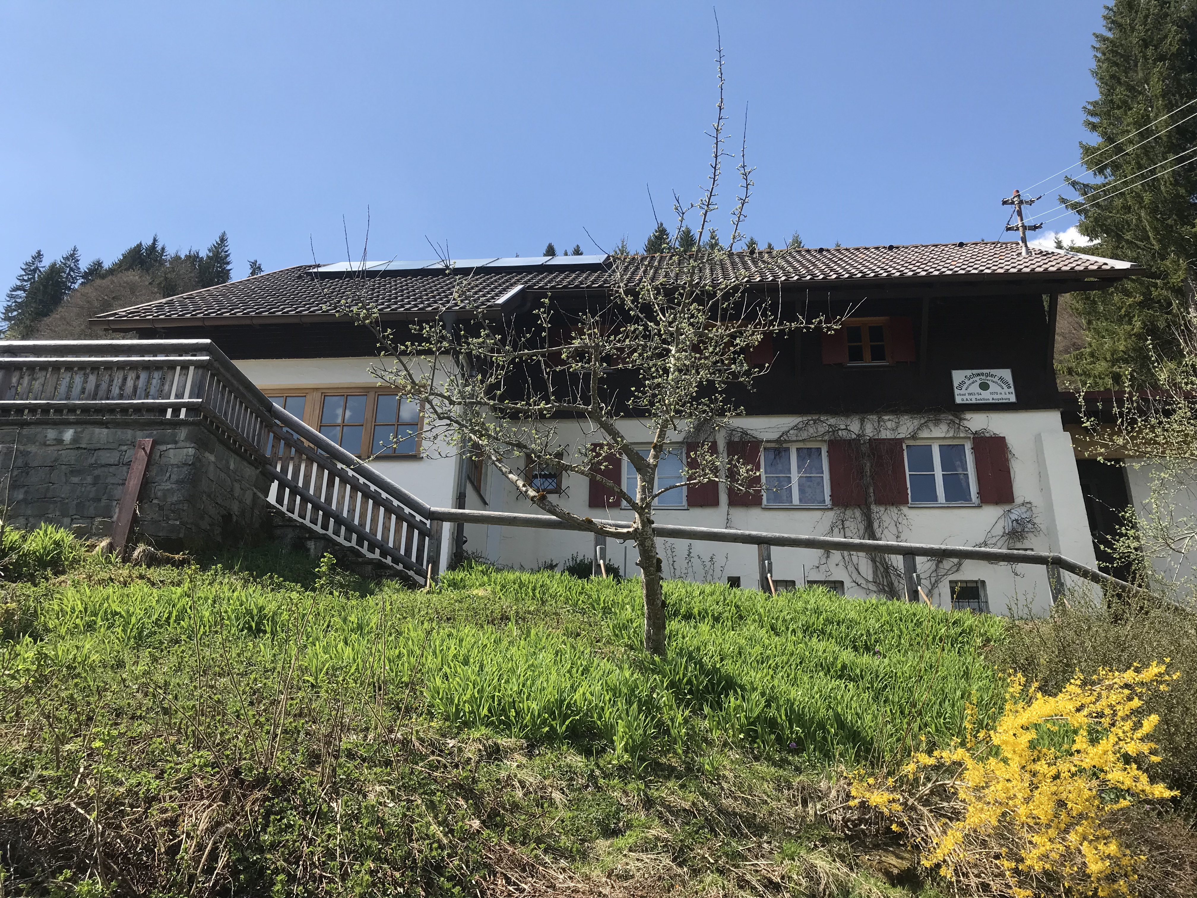 Ansicht der Otto-Schwegler Hütte von Osten